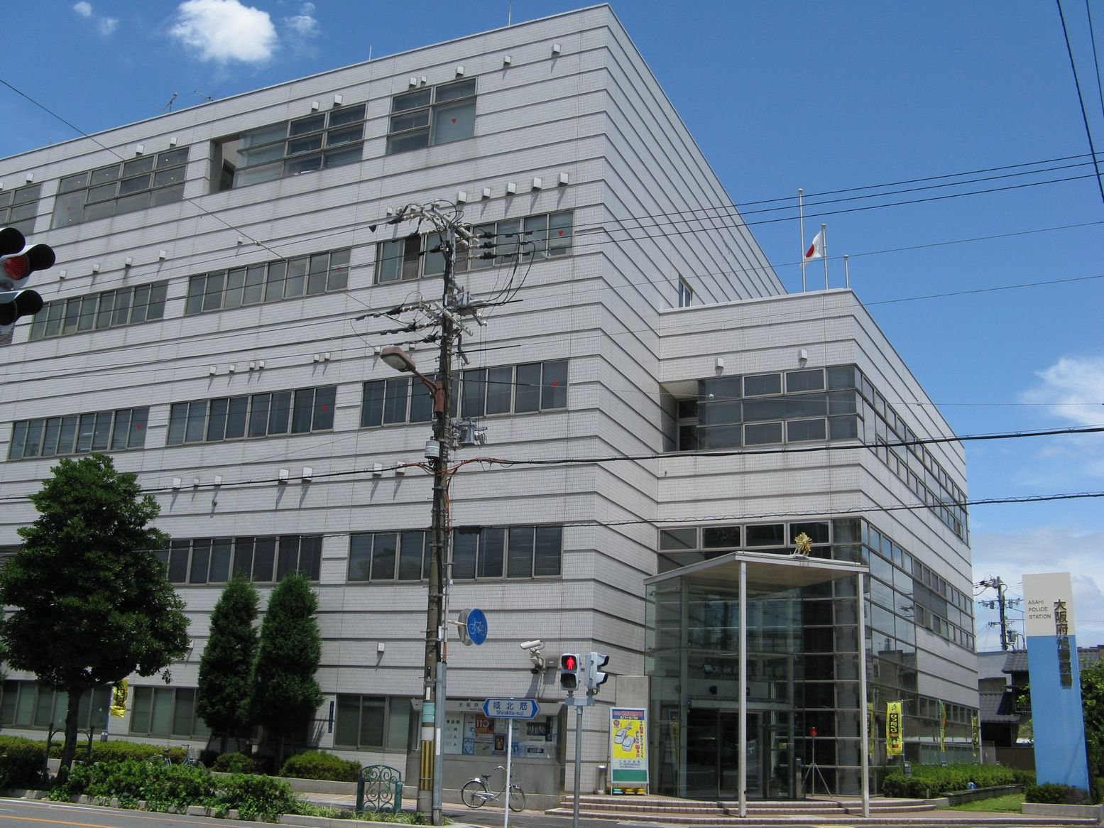 旭警察署 (大阪府)